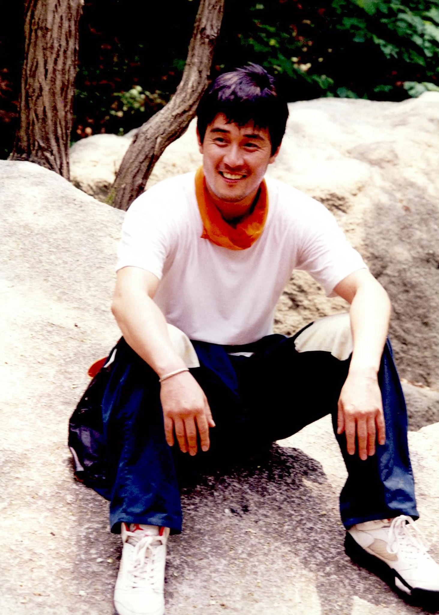 2000년 영화 리베라메